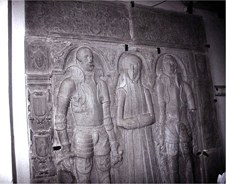 Bosjö Kirke i Danmark. Gravsten over Poul Laxmand, Thale Ulfstand og sønnen Poul Laxmand